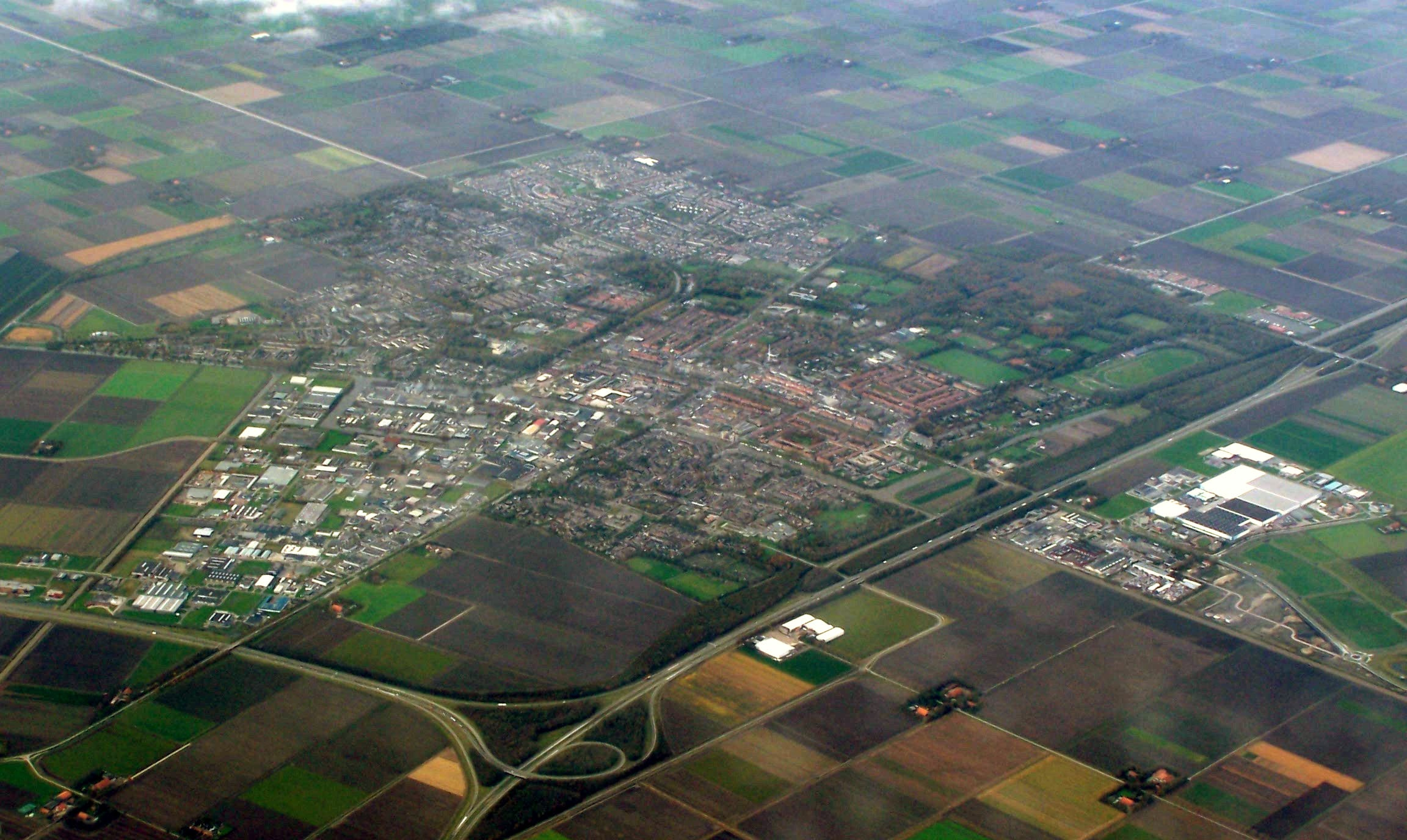 Emmeloord Emmeloord